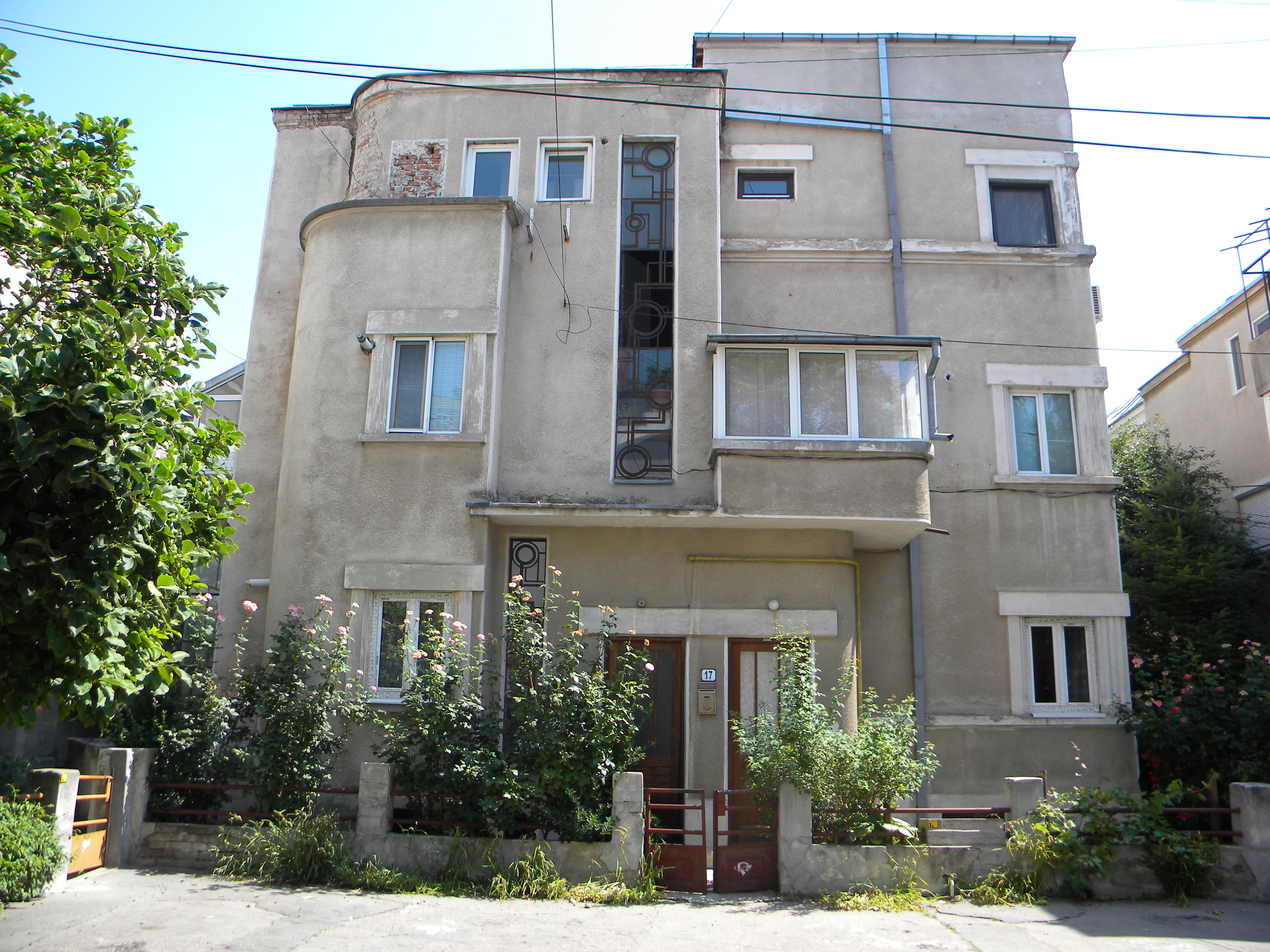 Bucuresti, Romania, Imobilul nr. 17 de pe Str. Naum Ramniceanu; B-II-m-B-19536